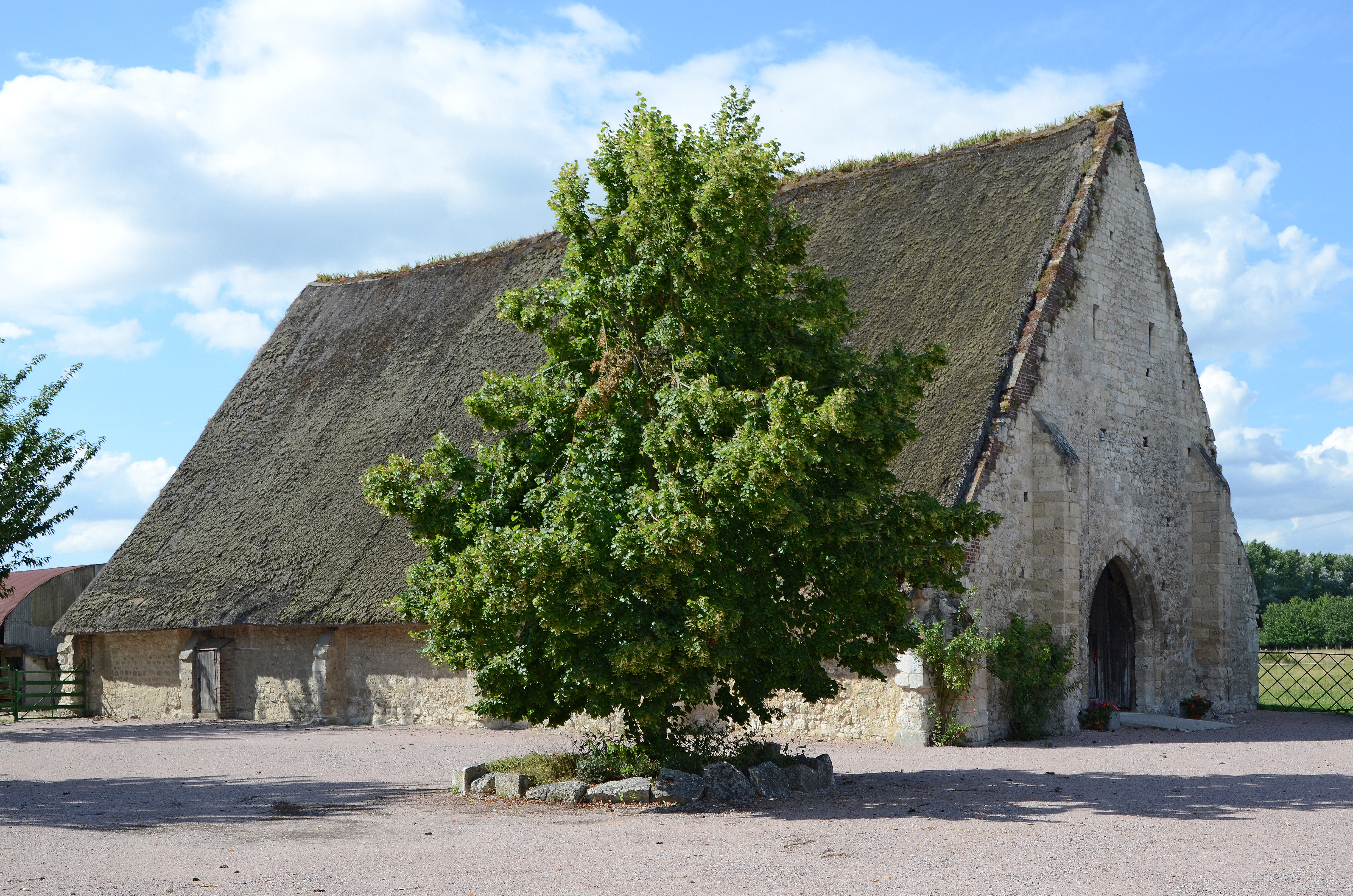 Grange dimière à Heurteauville, Seine Maritime, France .